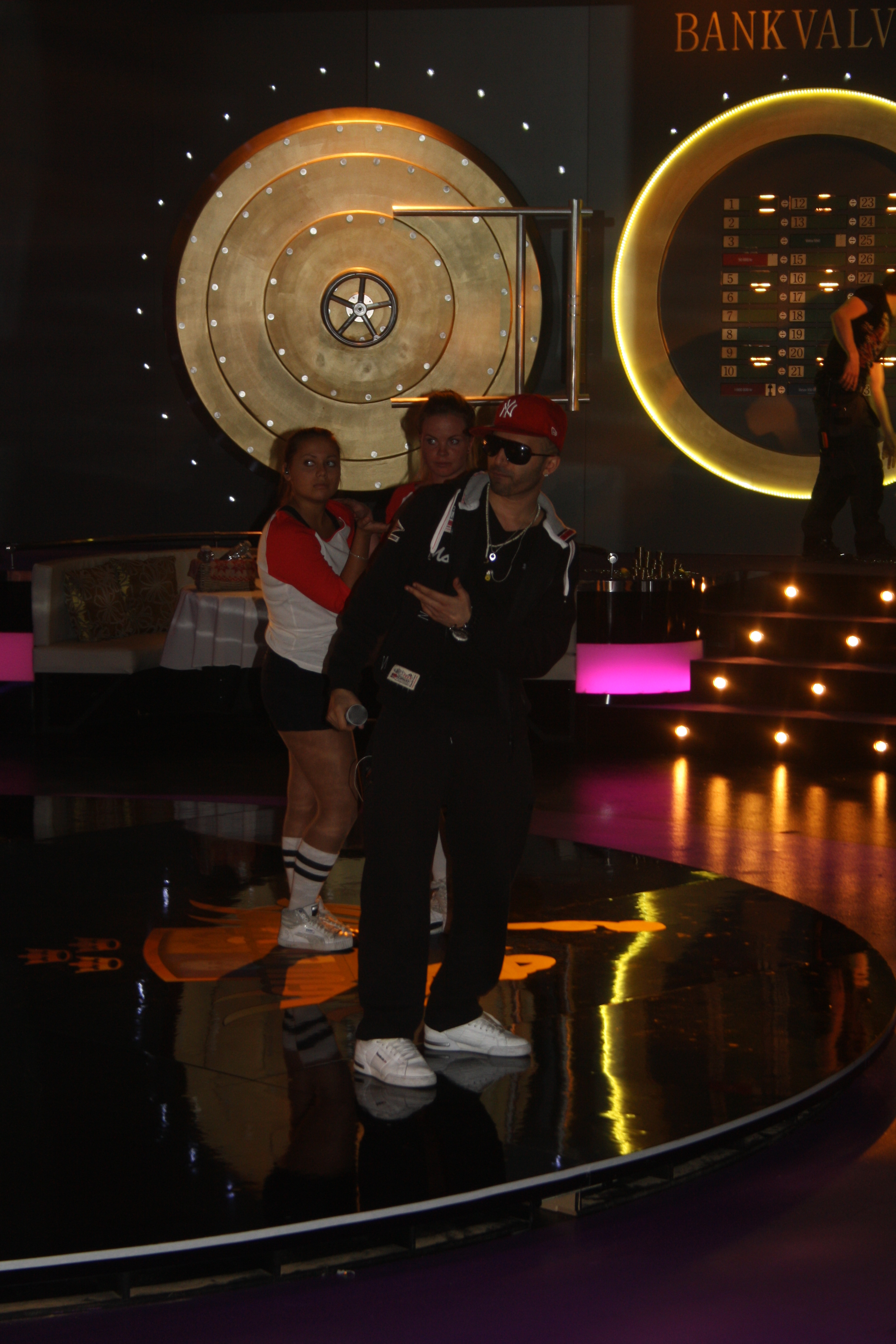 Jean Banan i Bingolotto-studion